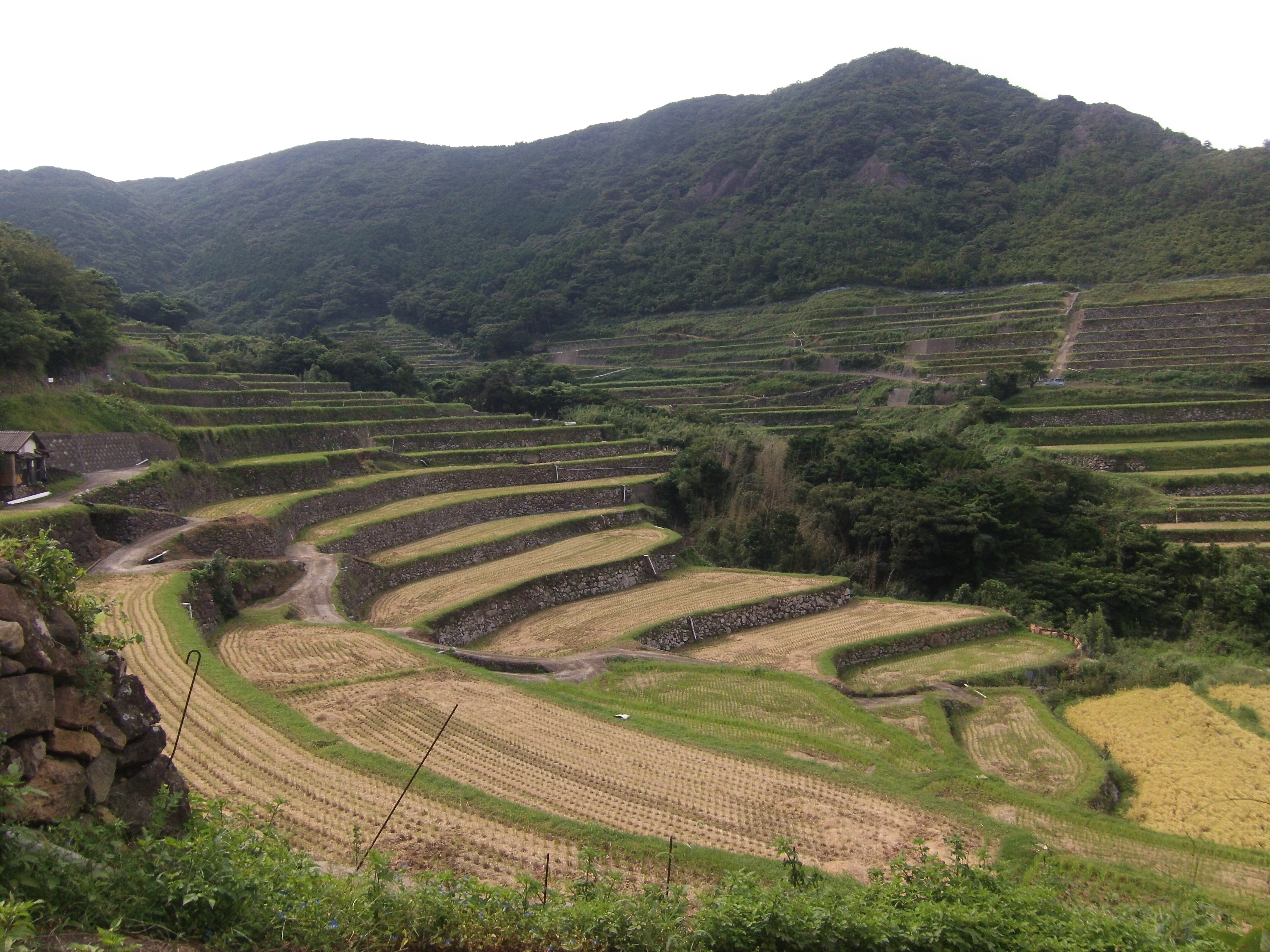 世界遺産候補「長崎の教会群とキリスト教関連遺産」の構成資産で、重要文化的景観でもある長崎県平戸島・春日集落の棚田